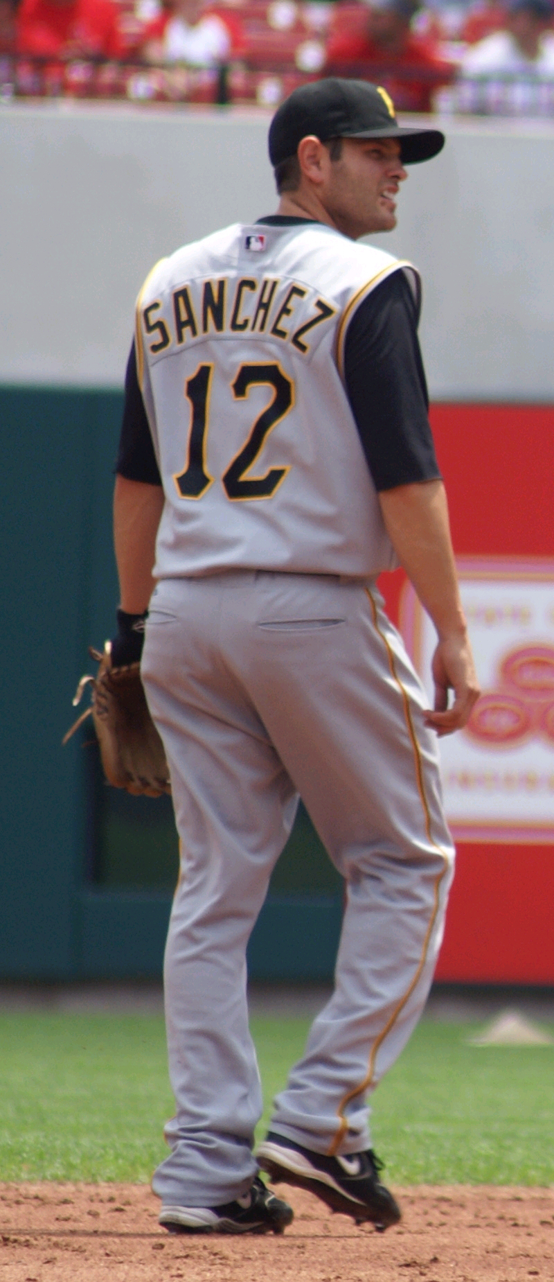 Freddy Sanchez